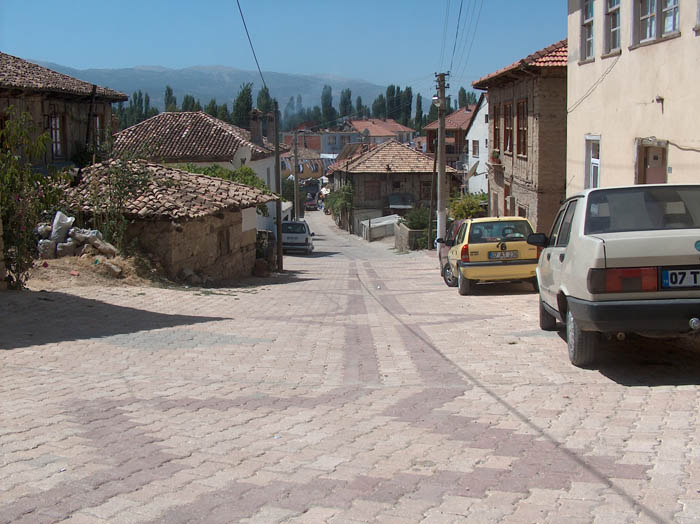 Akçay'ın bir yolu